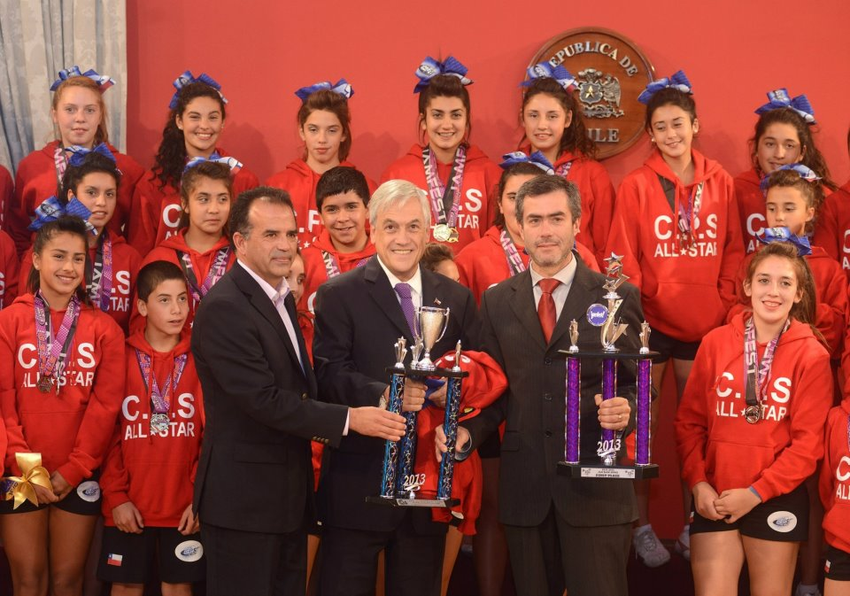 "Una grata sorpresa se llevaron al regresar al país, los jóvenes integrantes del equipo de cheerleaders del colegio de la Preciosa Sangre de la ciudad de Pichilemu, que ganaron hace unos días un torneo internacional de esa especialidad en la ciudad de Orlando Estados Unidos, cuando supieron luego de bajar del avión, que serian recibidos por el Presidente de la República Sebastián Piñera, luego de una gestión del gobernador de esta provincia, Julio Ibarra Maldonado. La visita se concretó pasado el mediodía donde compartieron con el Primer Mandatario, tal cual lo han hecho los más importantes deportistas de nuestro país tras un logro destacado, lejos de nuestras fronteras. La delegación de 28 niños y niñas de la comuna de Pichilemu tienen entre 12 y 19 años de edad y practican esta disciplina deportiva desde los 6 años. Luego de competir a nivel nacional en diferentes campeonatos, obtuvieron la posibilidad de representar a Chile en 2 torneos internacionales. En uno de ellos obtuvieron el 2do. Lugar y en el más importante el JAMFEST NATIONALS lograron ser campeones y recibieron el premio a la mejr coreografía, también compitiendo con equipos norteamericanos. Para poder participar en este torneo, los jóvenes recibieron un aporte gestionado por la Gobernación en el nivel central y otro aporte de la municipaliodad local, además de recursos que recolectaron a través de diferentes actividades." (descripción tomada del sitio web del Gobierno de Chile)